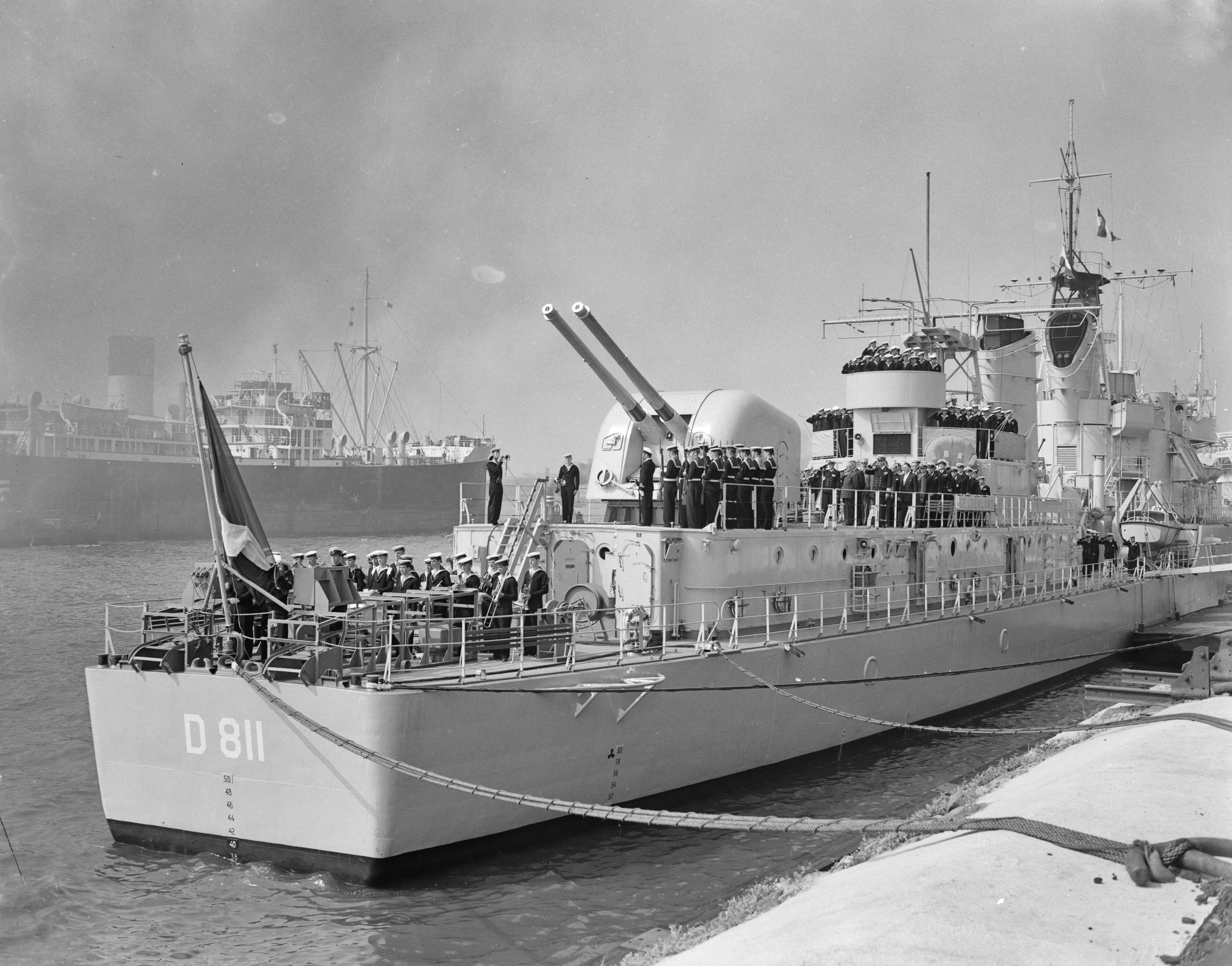 Collectie / Archief : Fotocollectie Anefo Reportage / Serie : [ onbekend ] Beschrijving : Indienststelling onderzeebootjager "Gelderland" Rotterdam Datum : 17 augustus 1955 Locatie : Rotterdam, Zuid-Holland Trefwoorden : Indienststellingen, onderzeebootjagers Fotograaf : Pot, Harry / Anefo Auteursrechthebbende : Nationaal Archief Materiaalsoort : Negatief (zwart/wit) Nummer archiefinventaris : bekijk toegang 2.24.01.04 Bestanddeelnummer : 907-2819